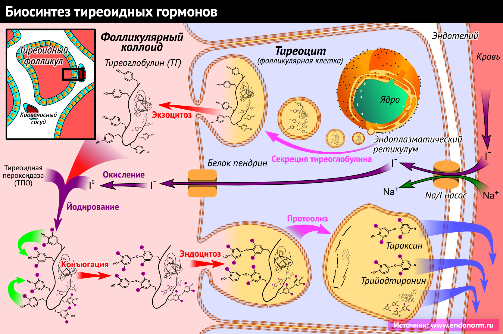 Биосинтез тиреоидных гормонов